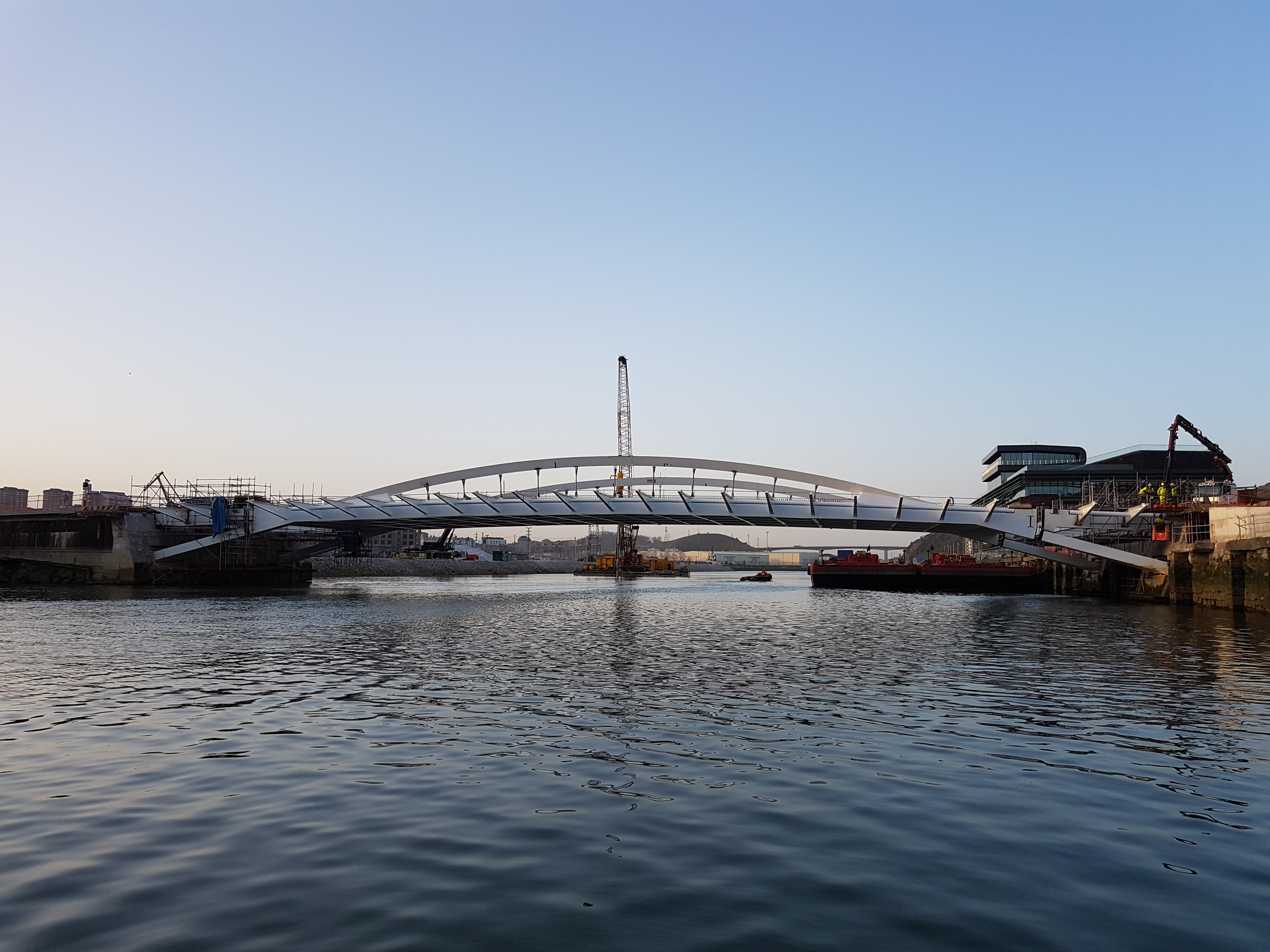 Puente San Ignacio-Zorrotzaurre.